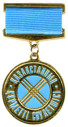 Нагрудный знак "Почётный архитектор"